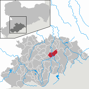 Wolkenstein im Erzgebirgskreis, Sachsen